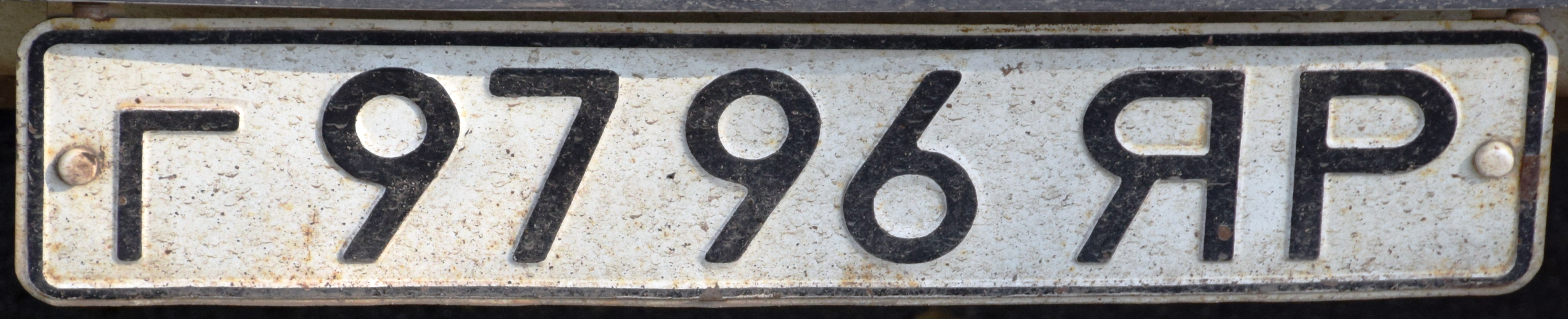 Oude kentekenplaat uit de Sovjet Unie tijd